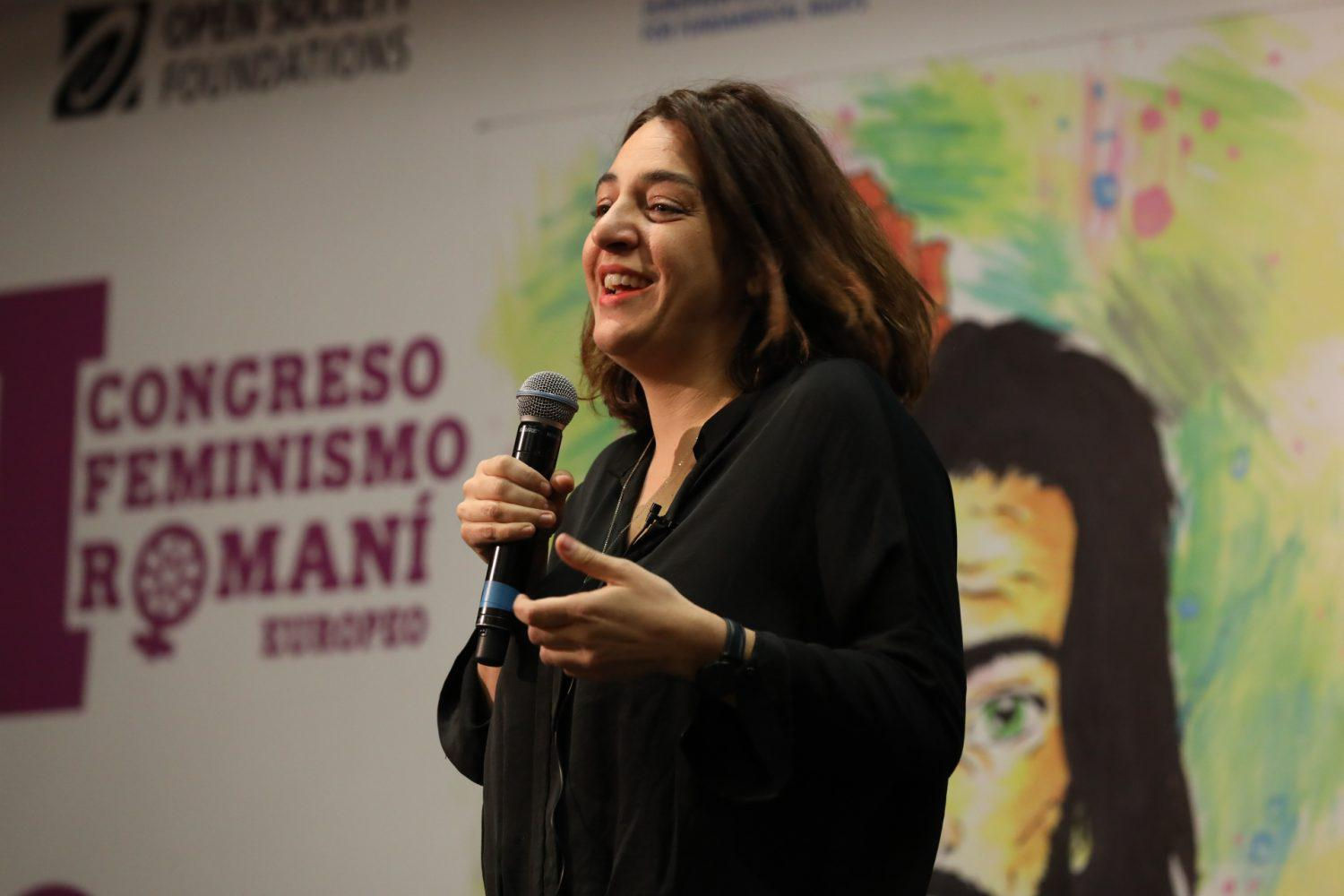 La delegada de Políticas de Género y Diversidad, Celia Mayer, ha participado en la inauguración del primer Congreso de Feminismo Romaní, organizado por la Asociación de Gitanas por la Diversidad, en colaboración con el Ayuntamiento de Madrid, la Agencia de los Derechos Fundamentales de la Unión Europea (FRA) y la Open Sociaty Foundations, y que se celebra en Madrid hoy y mañana.